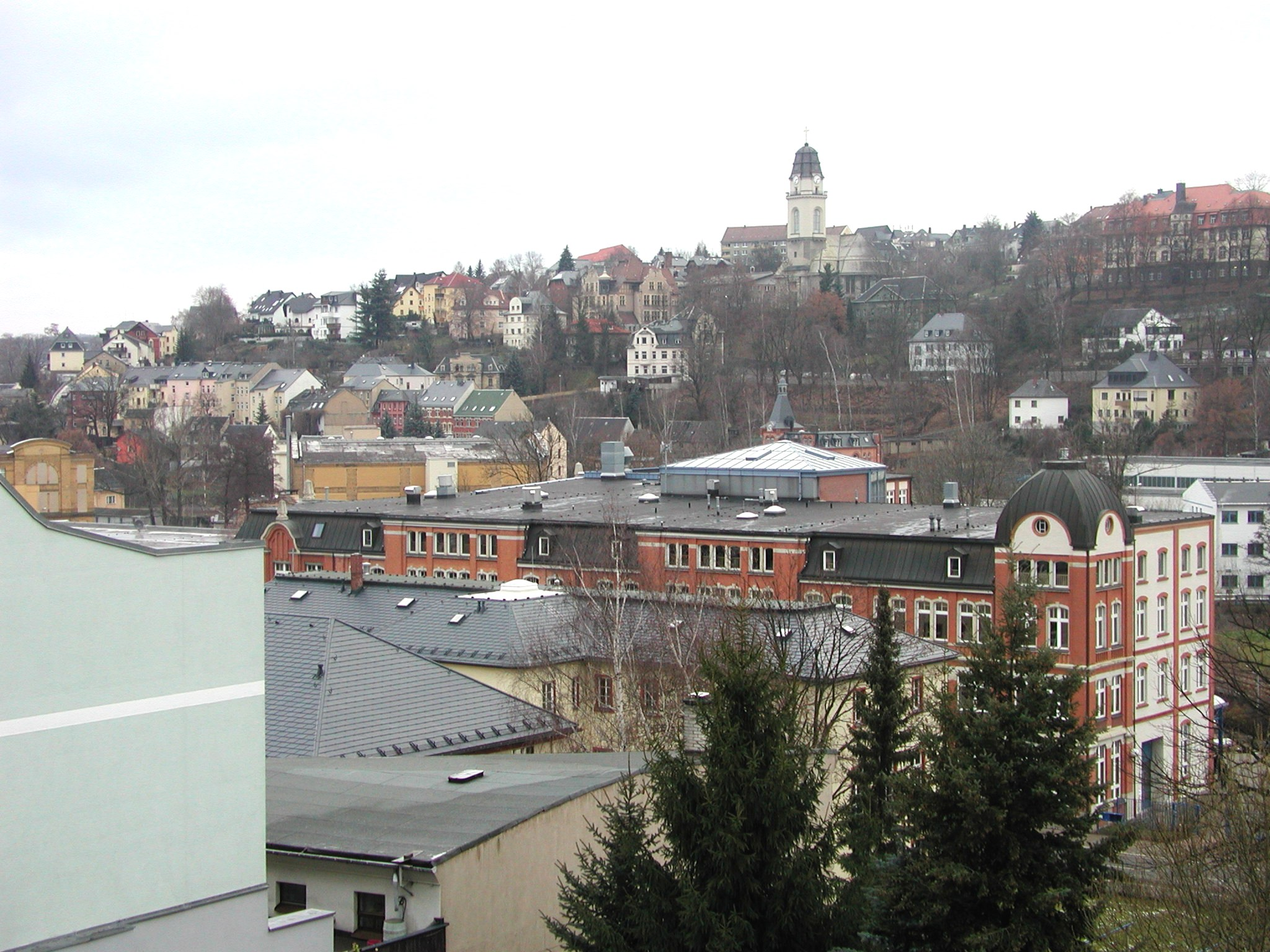 Blick auf den Stadtteil Zelle mit Friedenskirche und einem Teil des Klinikums